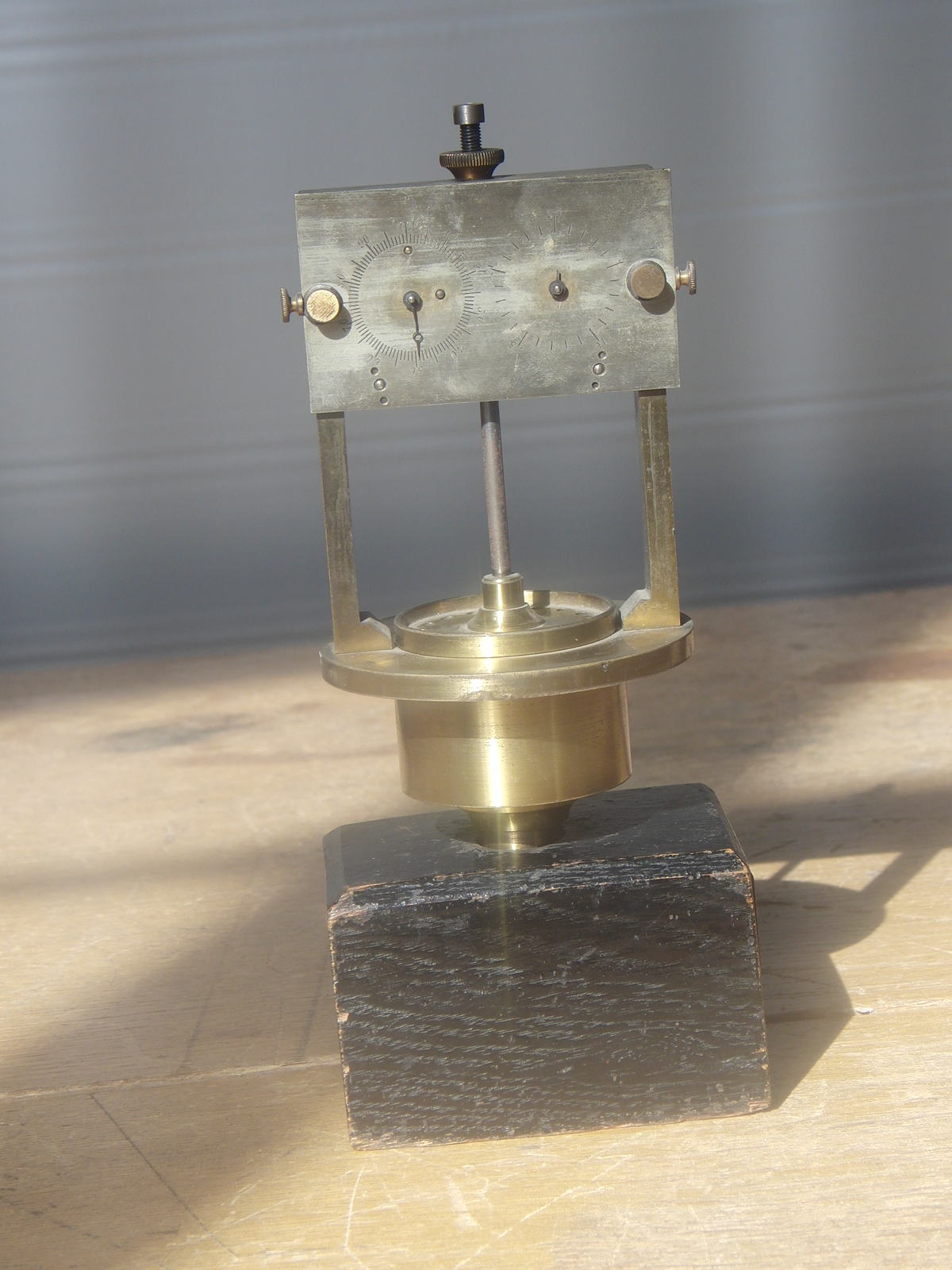 Sirène de Cagniard-Latour de face